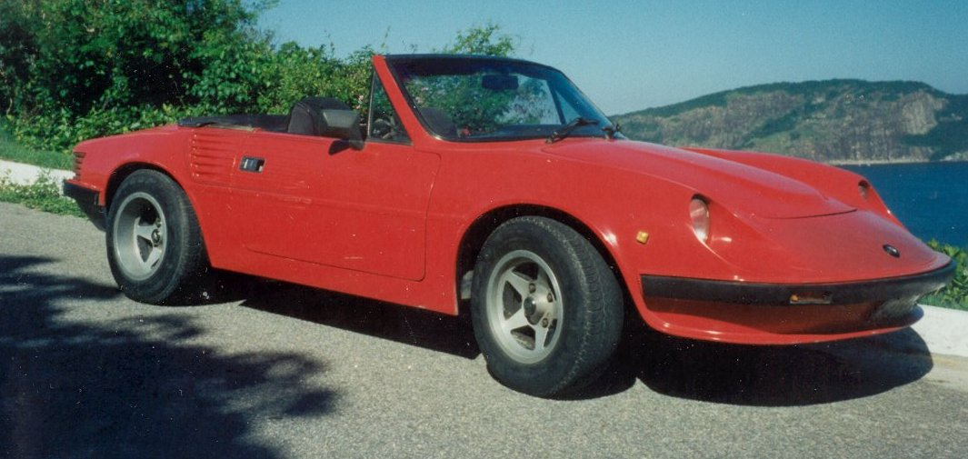 Puma GTC 1983, Único em Brasil ,Hoje encontra-se em Niterói-RJ Foram fabricados 40 para exportação , porem 2 ficaram no Brasil, o segundo teve um acidente e deu perda total. Logo só tem esse. Está todo Original e indo fazer uma reforma em Curitiba, na "master fibras" Foto Tira da Na Praia de Camboinhas Niterói-RJ RESPOSTA auteração, discordo. tenho tambem puma gtc 1983 verde igual ao da foto no site, tambem estou reformando. Moro em duque de caxias-rj,aos interessados meu email é